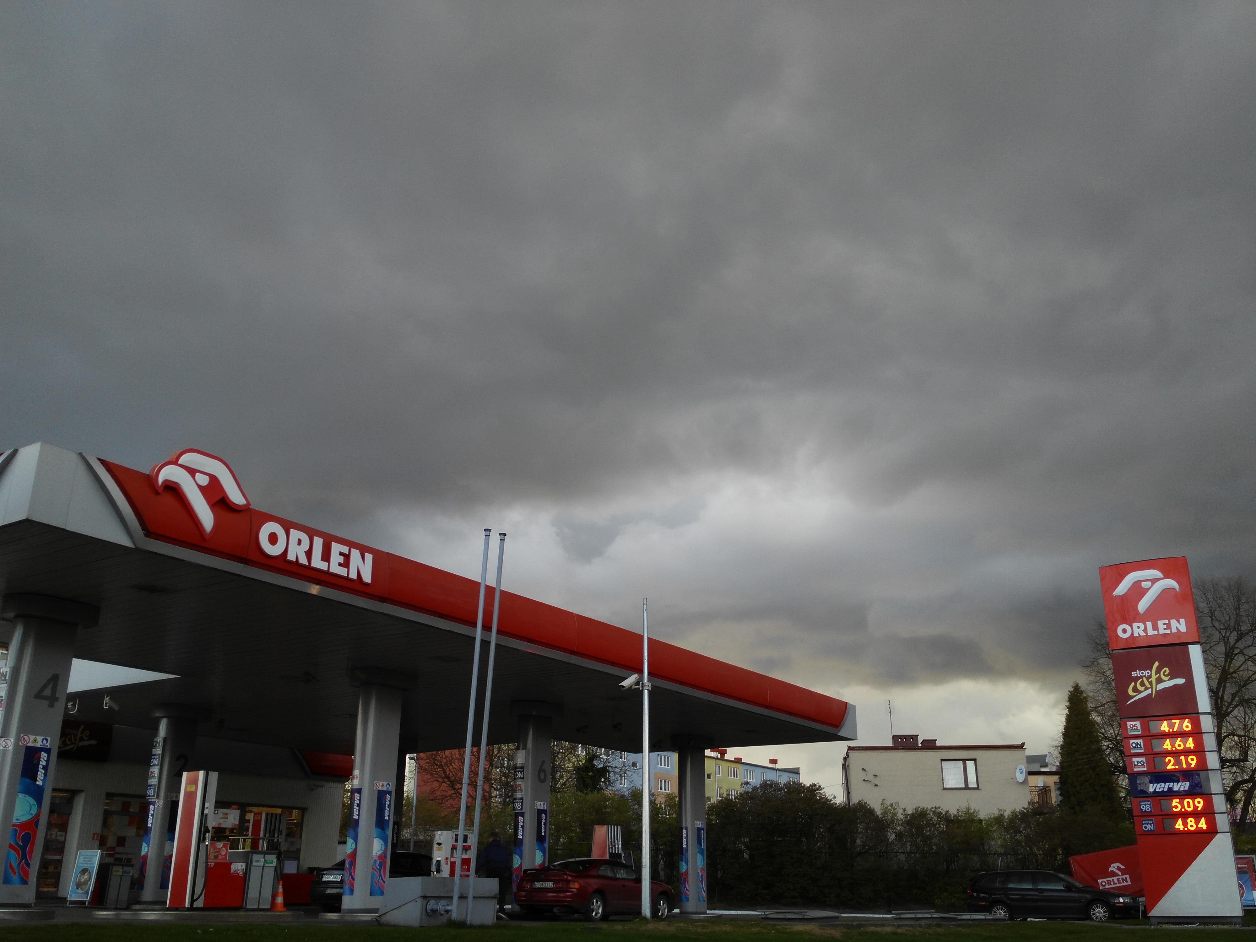 Stacja Paliw Orlen przy św.Antoniego. Tomaszów Mazowiecki